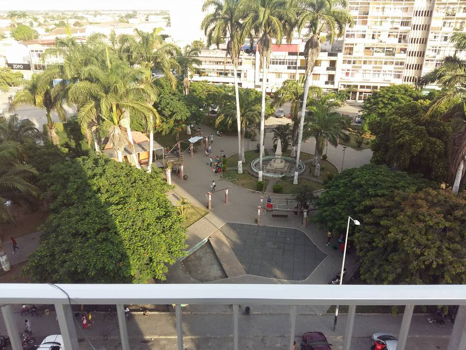 bengue5